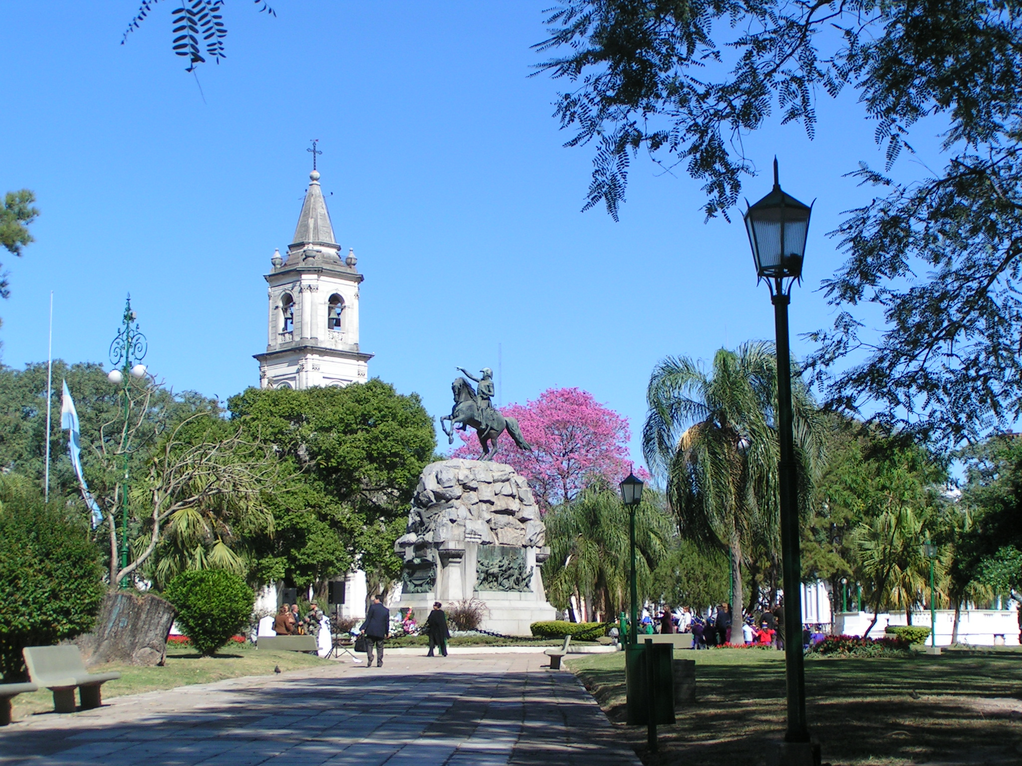 Plaza 25 de Mayo, Corrientes. La estatua ecuestre representa al general José de San Martín. El campanario al fondo pertenece a la Iglesia y Convento de la Merced.